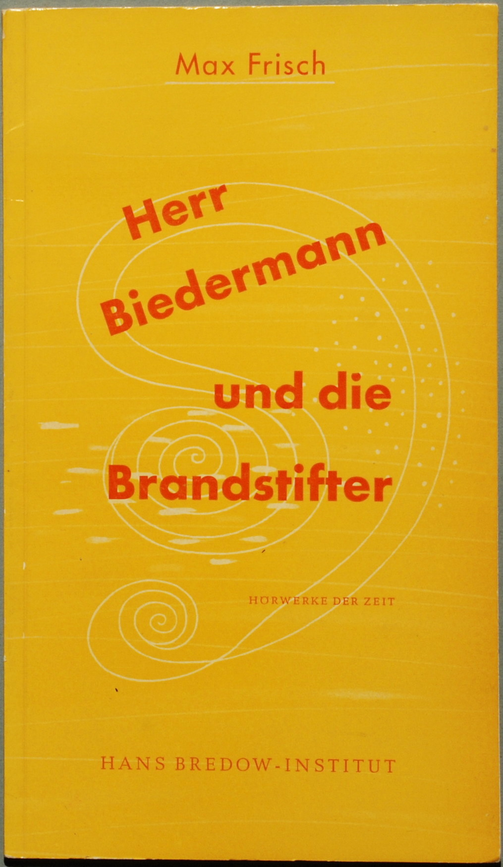 Frisch, Max: Herr Biedermann und die Brandstifter. Mit einem Nachwort von Christian E. Lewalter. Hamburg: H. Bredow, ohne Jahresangabe, 36 Seiten; (= Hörwerke der Zeit 2); Erstdruck (Wilpert/Gühring² 20). Original-Karton mit geradem Rücken. Erstsendung des Hörspiels "Herr Biedermann und die Brandstifter" im März 1953 Bayerischer Rundfunk.